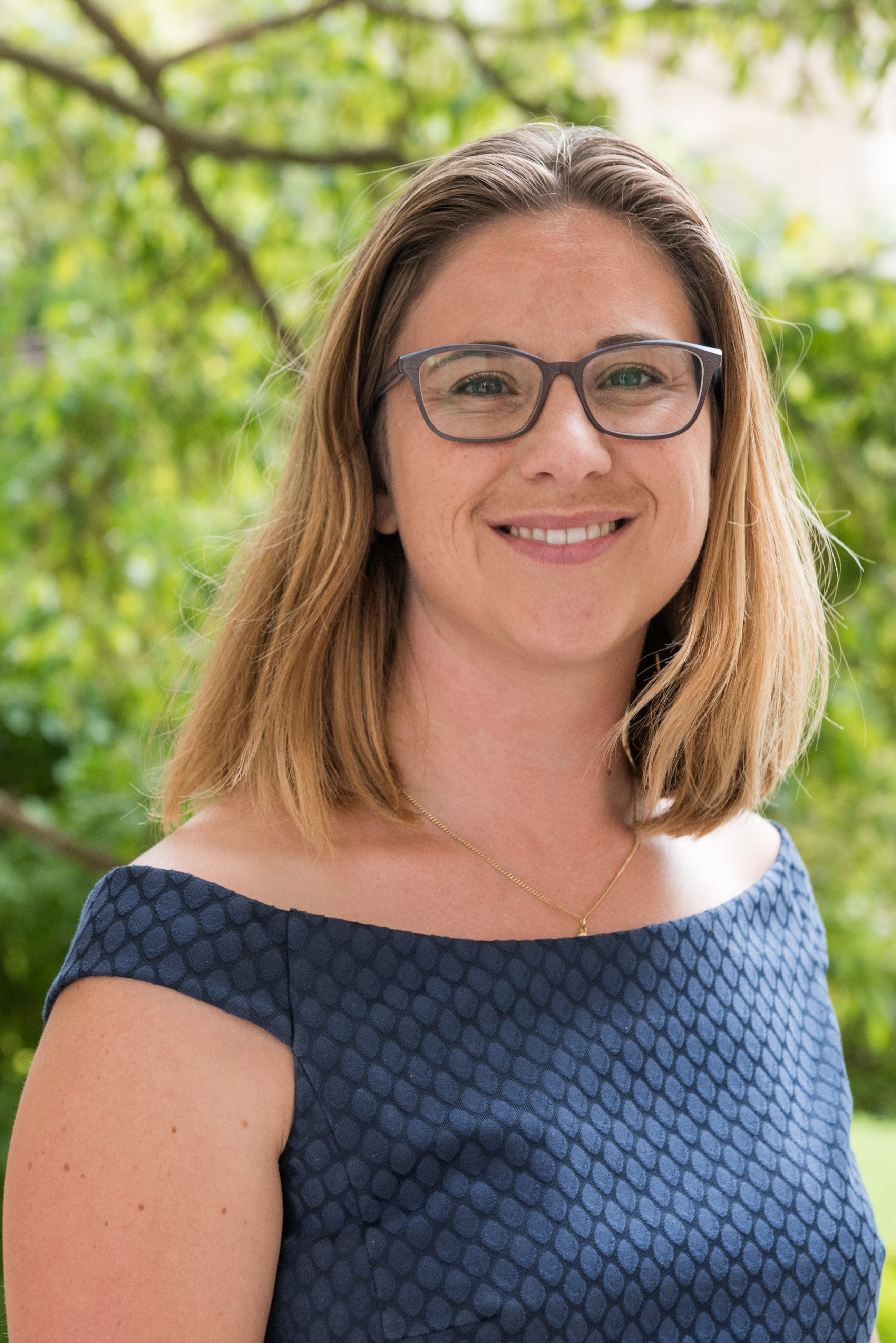 Marjolaine Meynier-Millefert dans le jardin des Quatre colonnes du palais Bourbon en 2017.